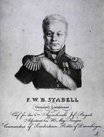 Frederik Wilhelm Bruenech Stabell (1763-1836), Norwegian general. Lithograph.